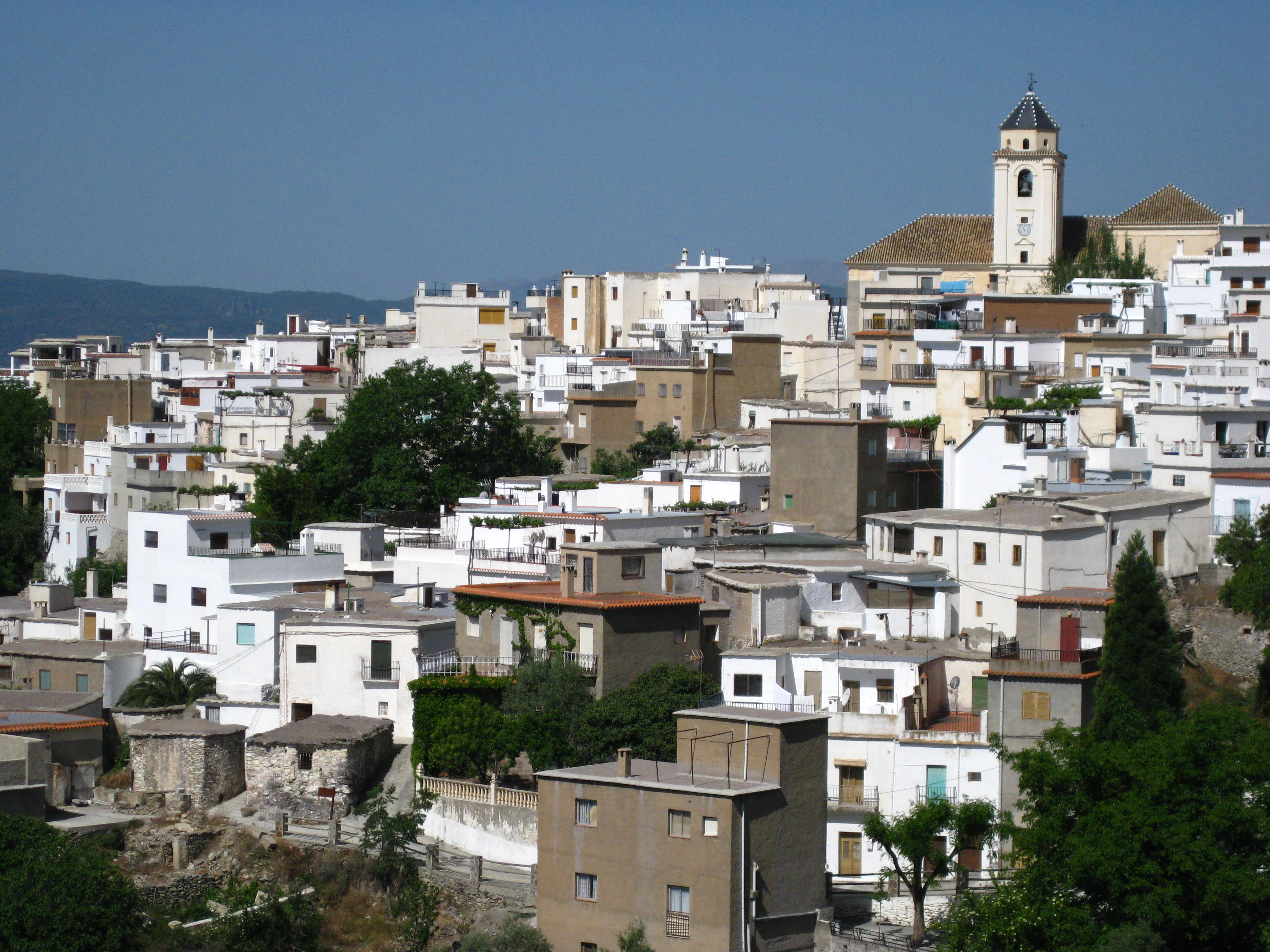 Cañar